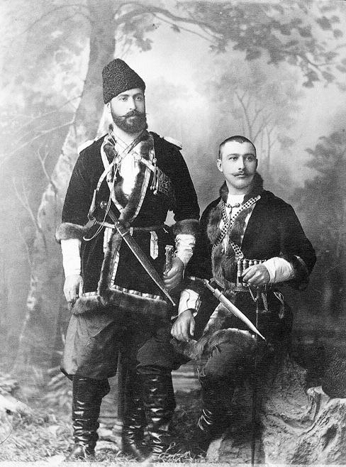 Д.Ермаков. Грузины